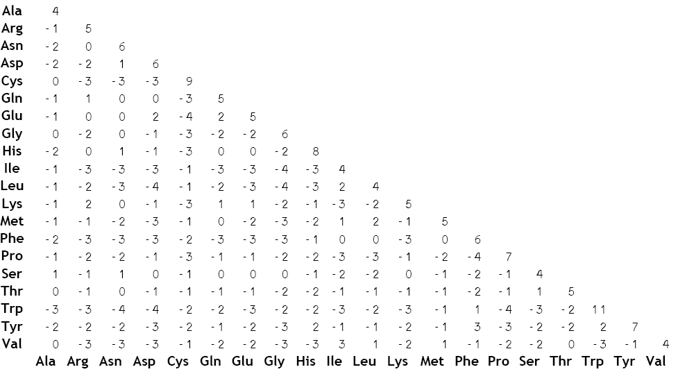 BLOSUM62 matrix